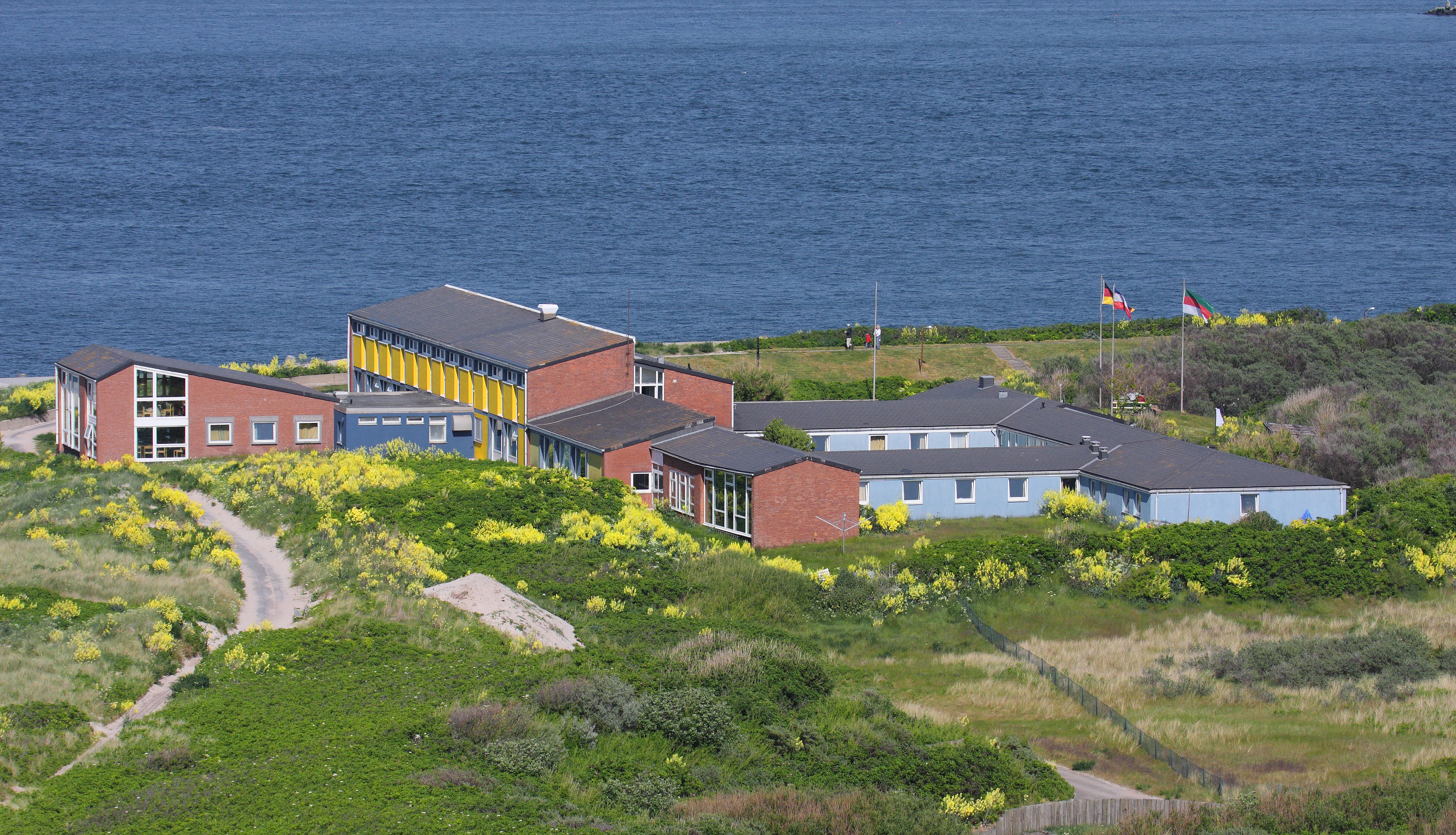 Jugendherberge Helgoland